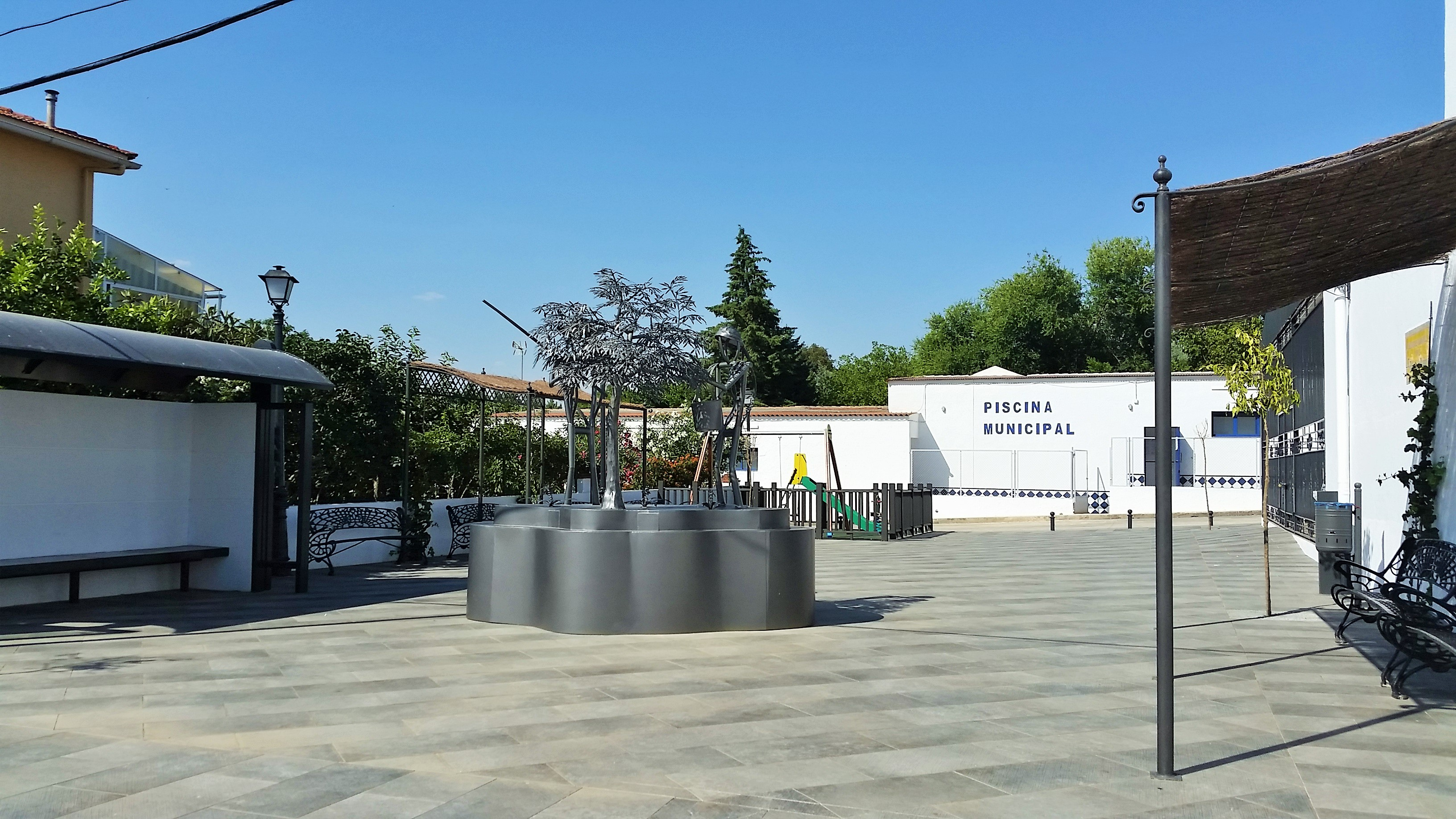 Piscina municipal